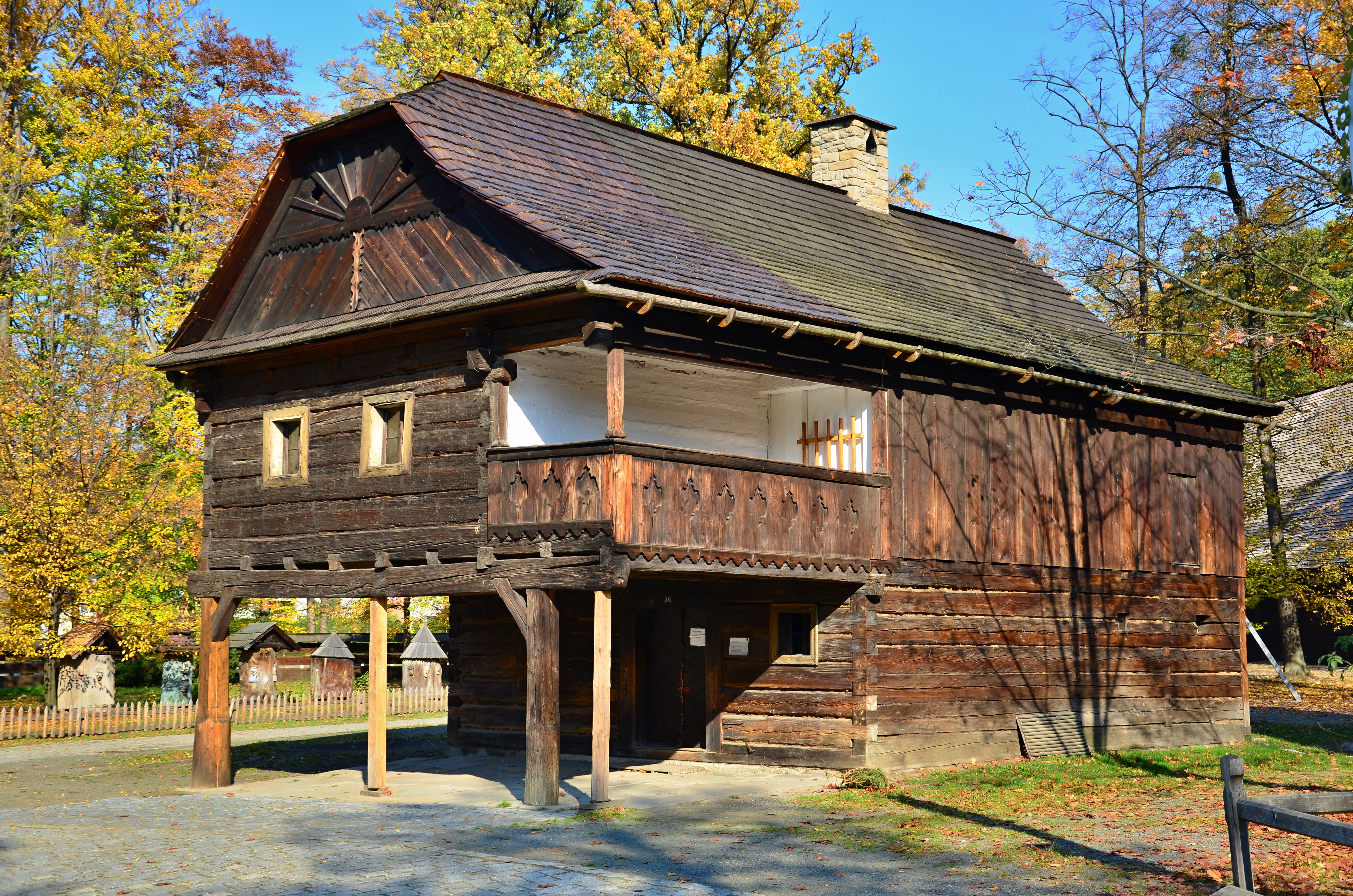 Muzeum - skanzen (Rožnov pod Radhoštěm), Rožnov pod Radhoštěm 242